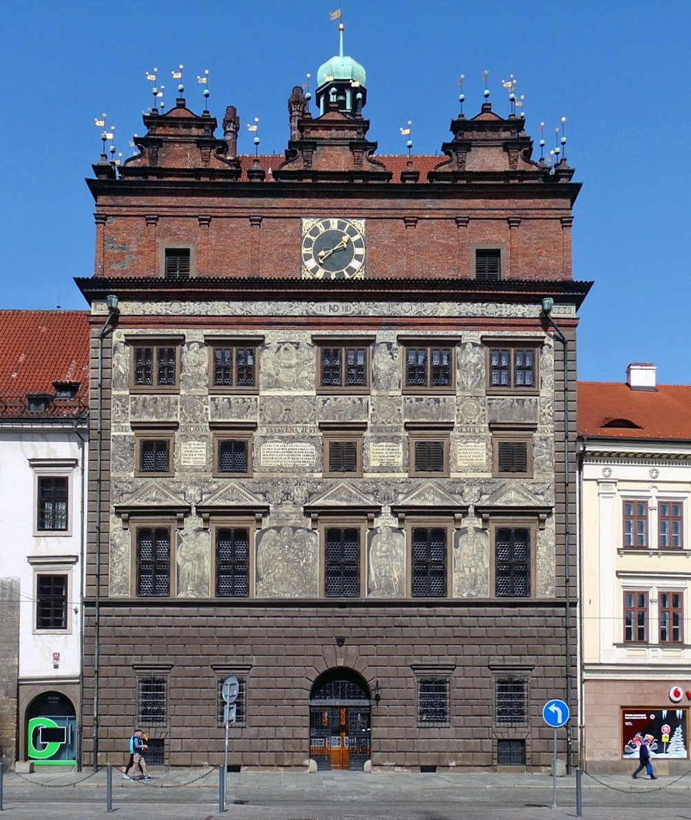 Das Rathaus von Pilsen